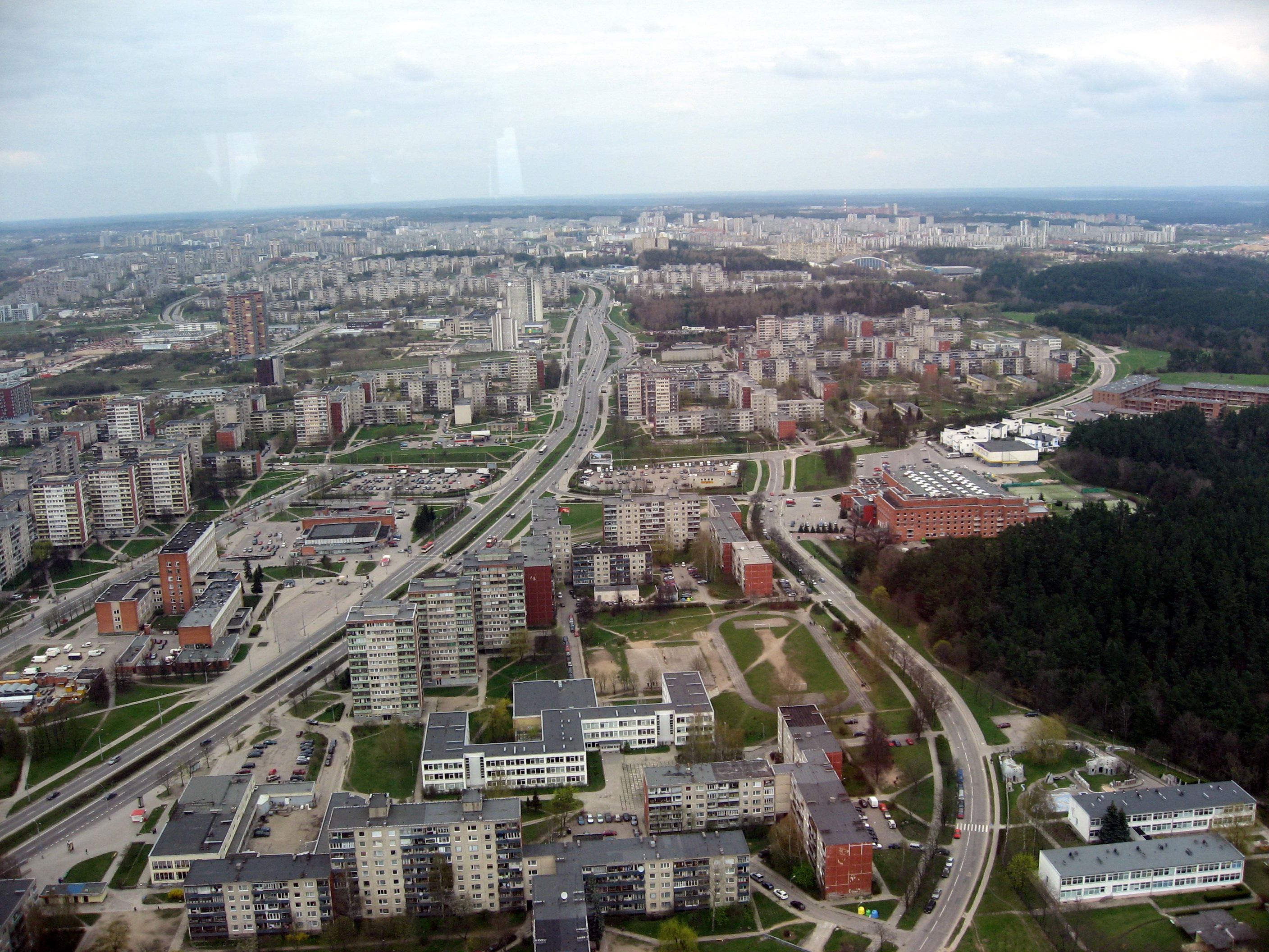 Výhled z Vilniuské televizní věže